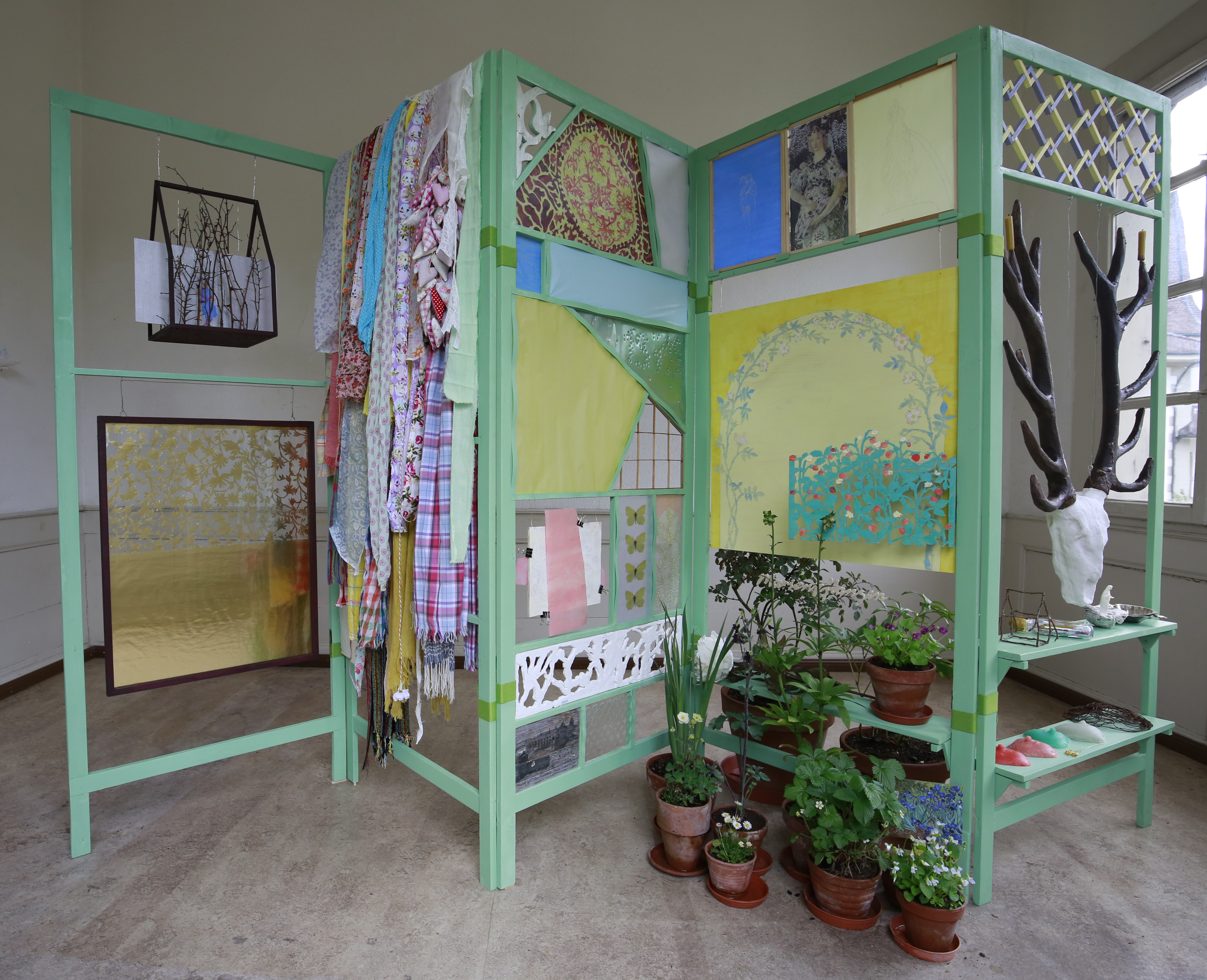 2018 Am Brunnen hinterm Tore Paravent, Multimedia